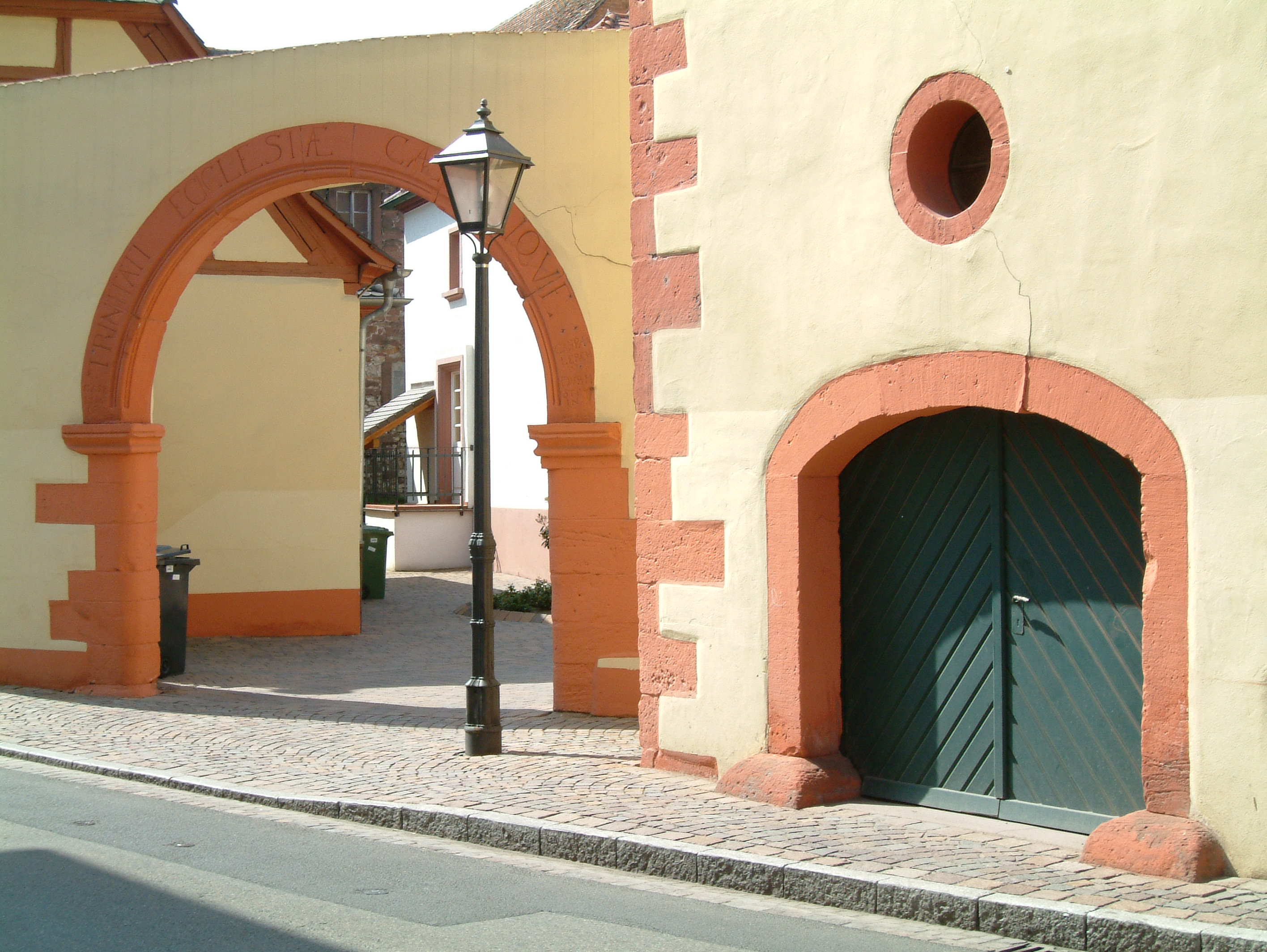 Spitalhof (Torbogen) zu Dirmstein, selbst fotografiert am 24.04.2006 und freigegeben durch Benutzer:Mundartpoet